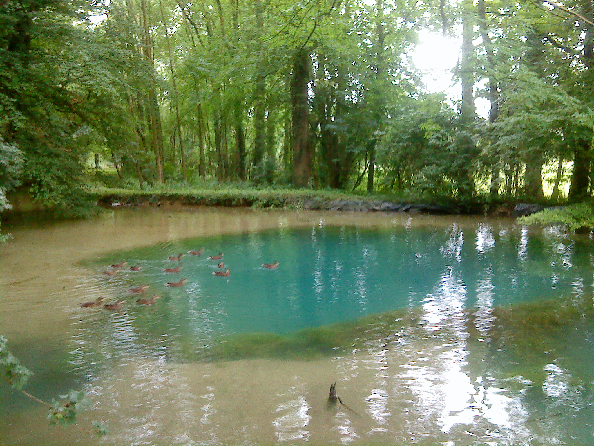 Die Karstquelle Storchenkolk bei Kirchborchen